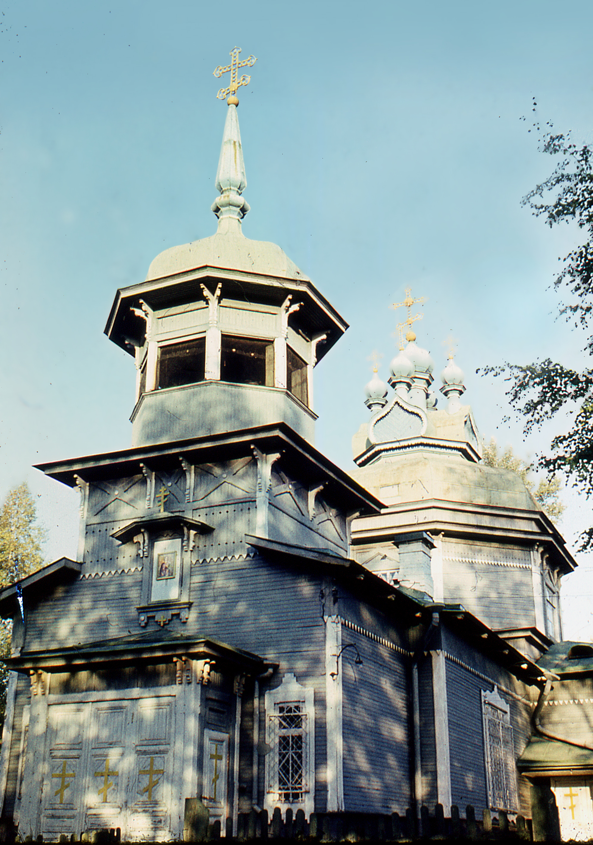 Ц.Дмитрия Солунского